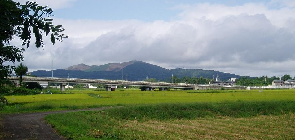 本人撮影